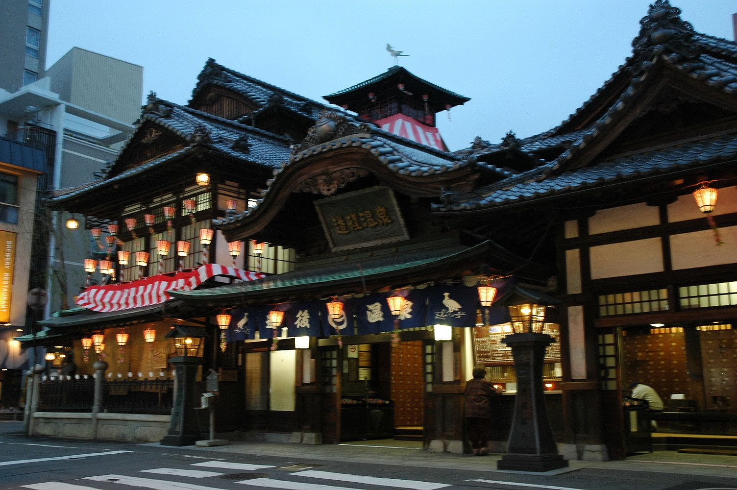 松山市 道後温泉 Nikon D70